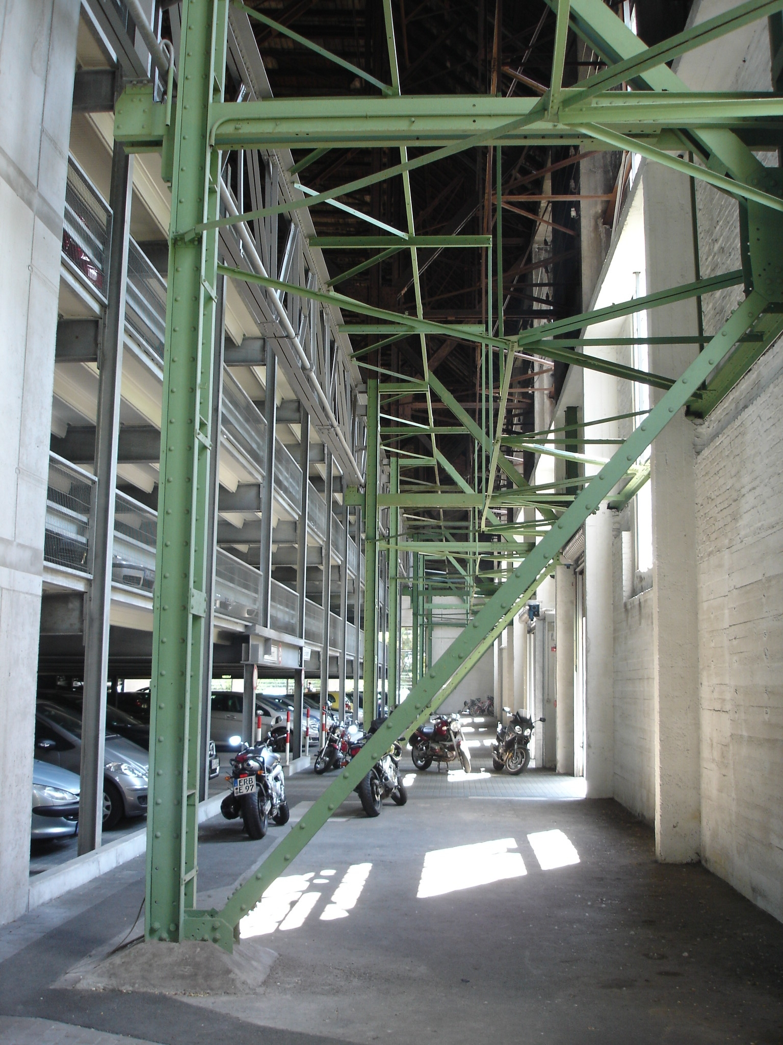 Das Bild zeigt den Innenraum mit dem alten Tragwerk. Das Parkhaus links ist eine moderne, selbständig eingestellte Konstruktion.